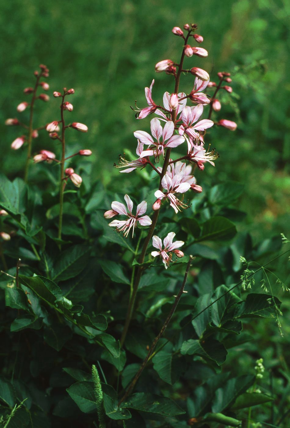 Diptam (Dictamnus albus), Rautengewächse (Rutaceae) - Tschechien/Česká republika/Czech Republic: Jihomoravský kraj, Okres Znojmo, Thayatal/Podyjí Sealsfieldův kámen NW Popice